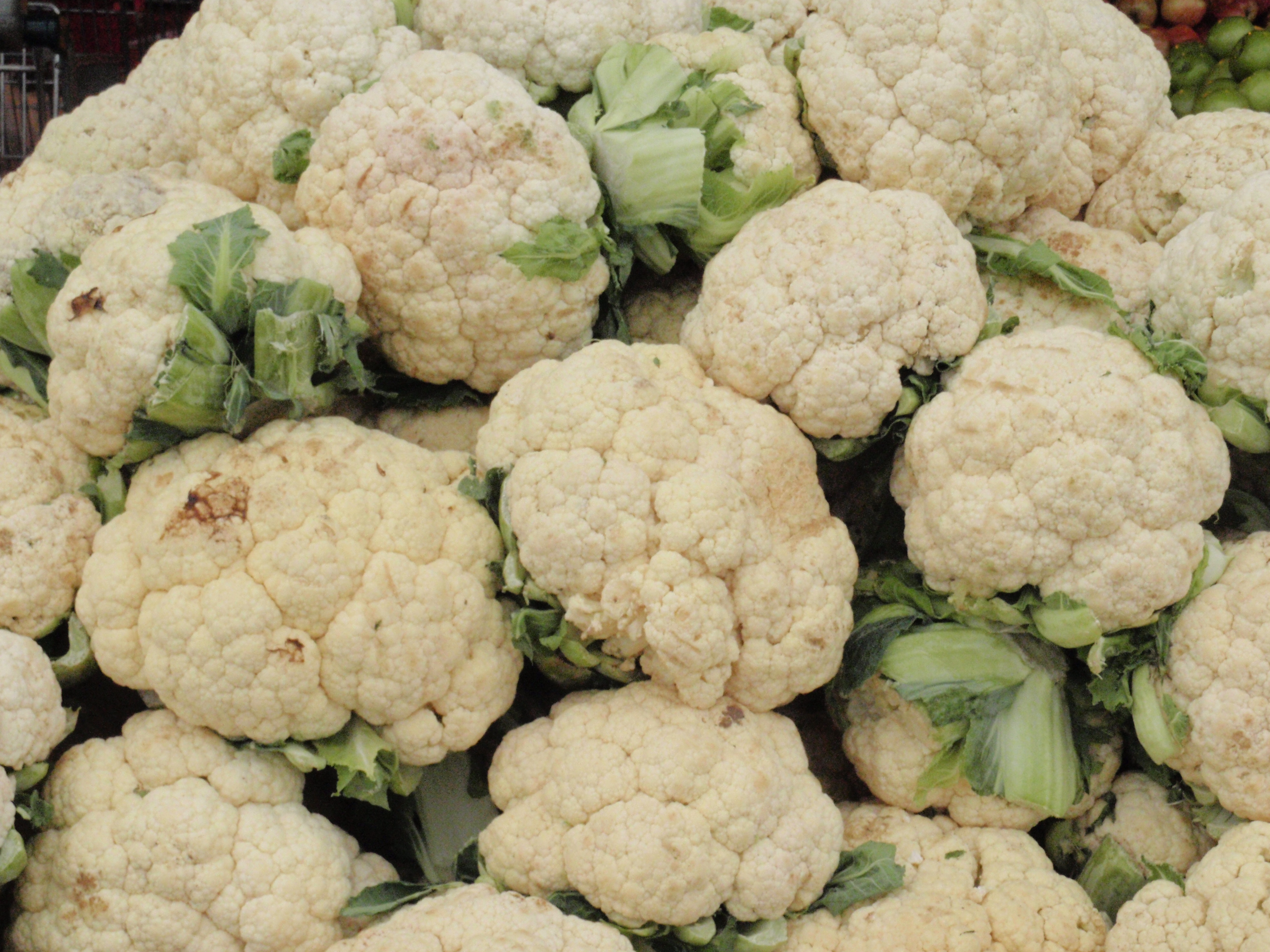 Shuk Hsayarim ירקות בשוק הסיירים Cauliflower at Sayarim-Market